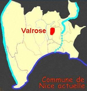 Pairolière et Zanin